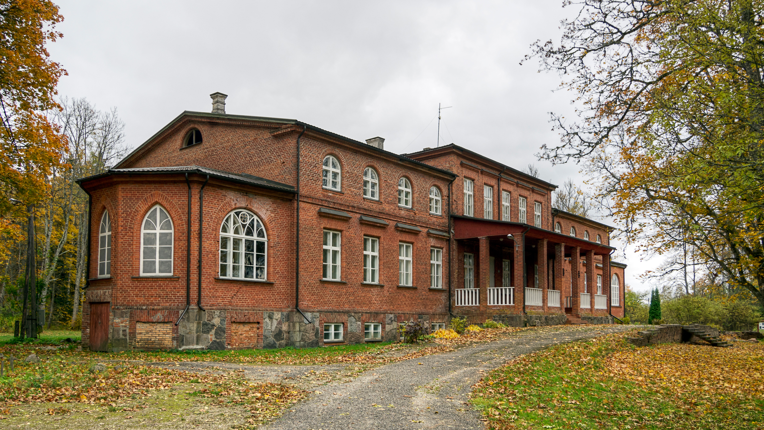 Allikukivi kalevivabriku direktori elamu